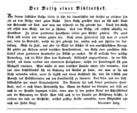 Alexander Jung: Der Besitz einer Bibliothek, aus: Karl Gutzkow (Hrsg.): Unterhaltungen am häuslichen Herd, 1. Band, S. 367